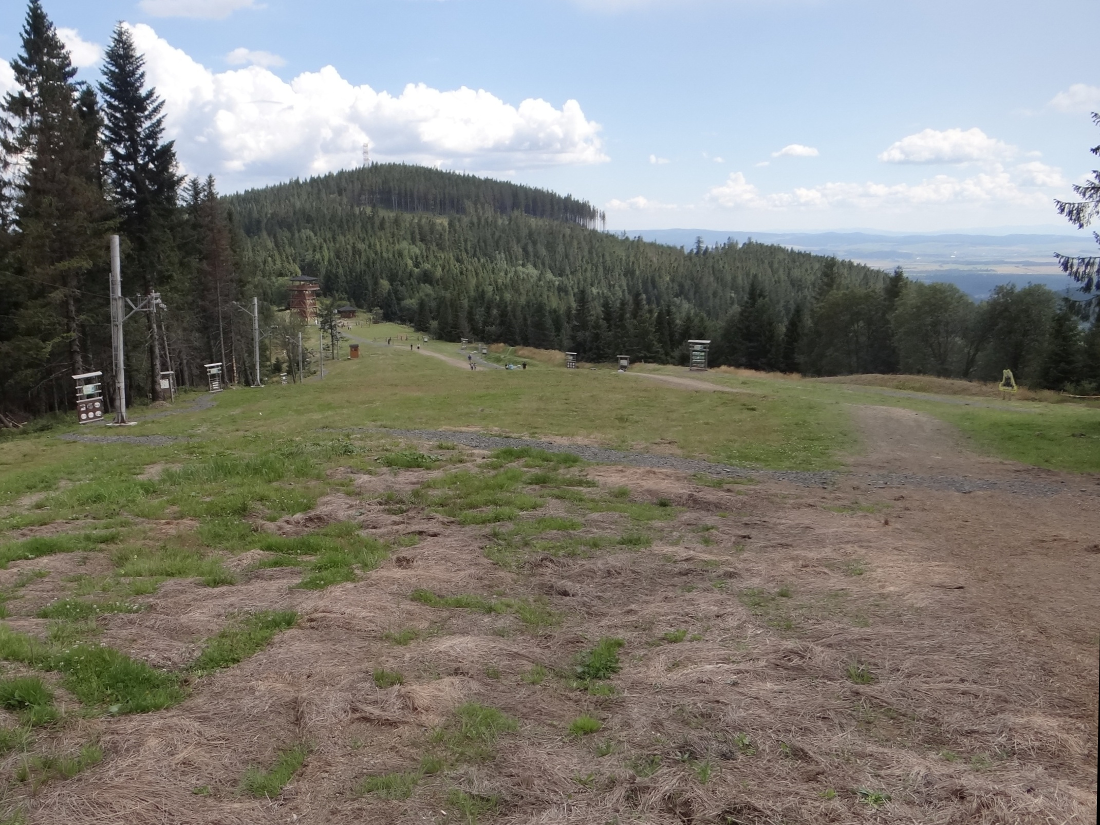 Bukovina